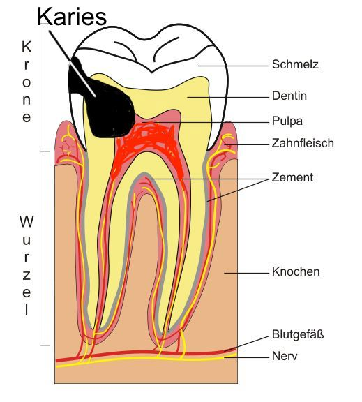 Zahnquerschnitt mit kariösem Defekt based on Image:Tooth_Section.svg